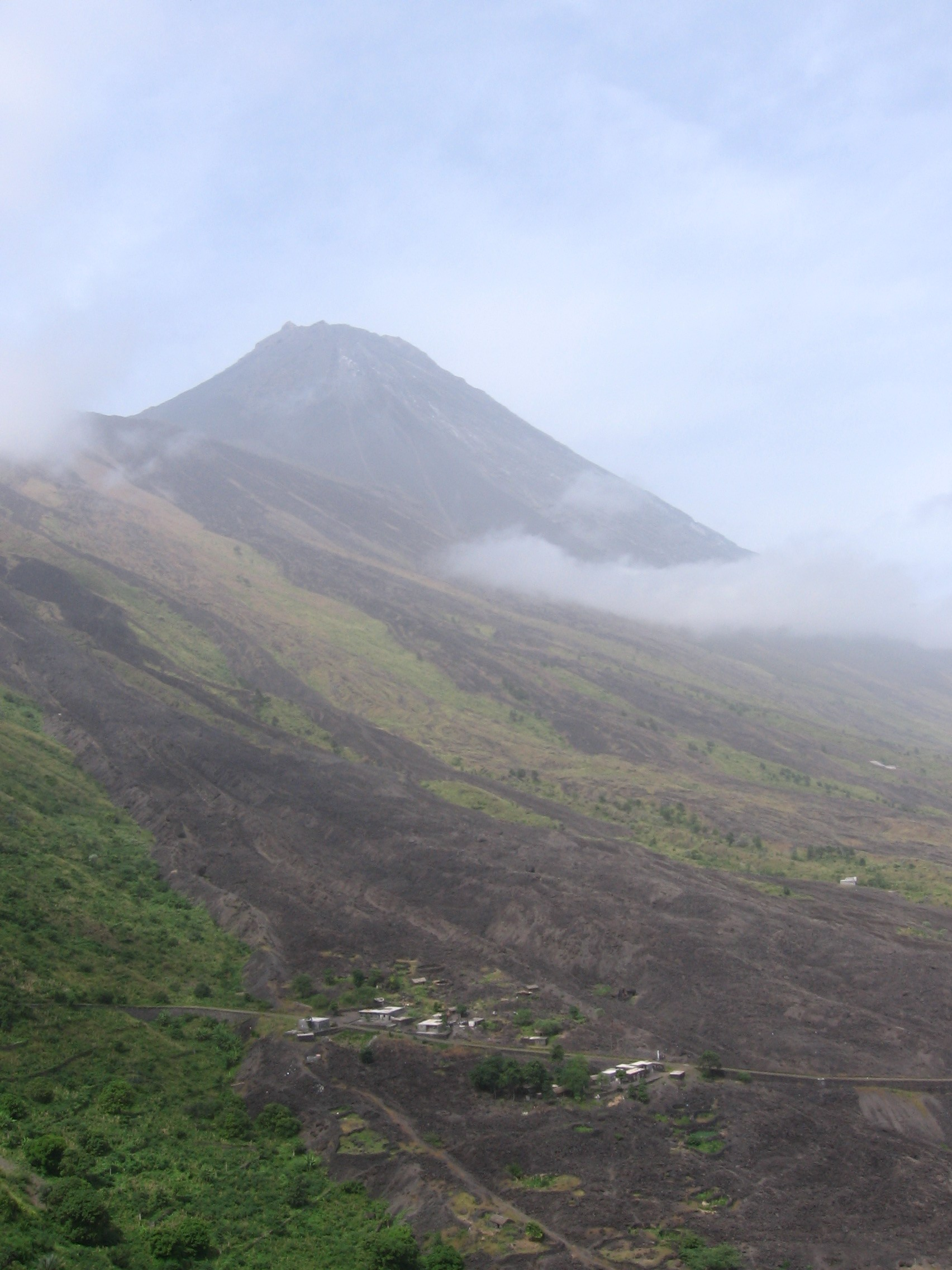 Vertente leste do Pico do Fogo, ilha do Fogo, Cabo Verde